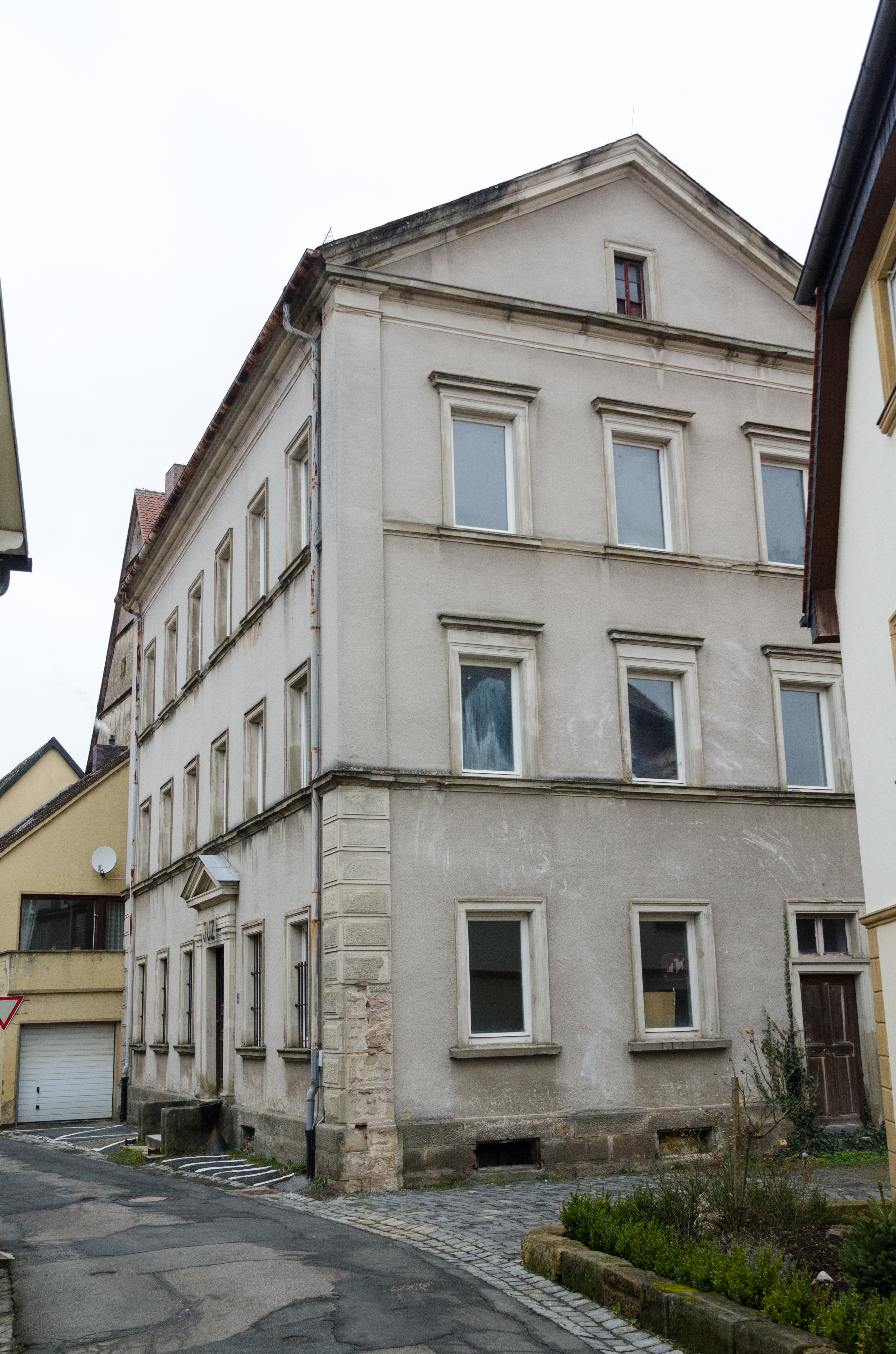 Weismain, Von-Rudhart-Straße 1